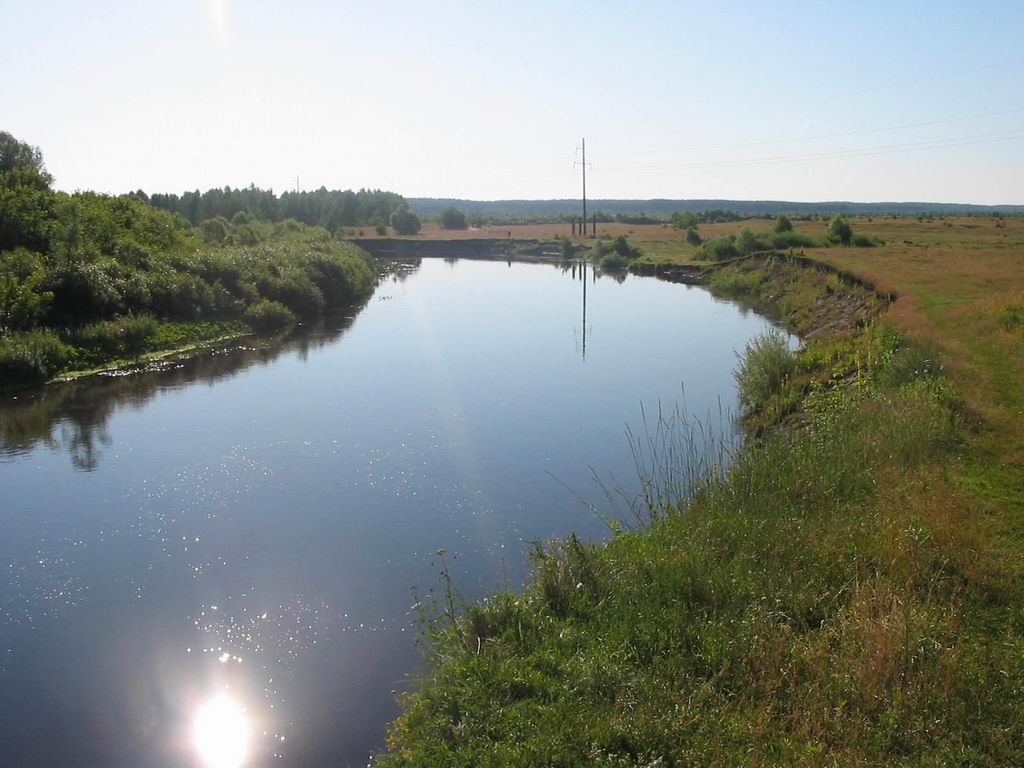 Snov river (Sedniv, Ukraine) - 1